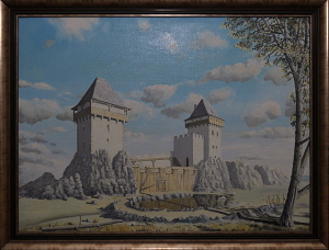 Hrad Losumberk, olej na plátně 100x75 cm